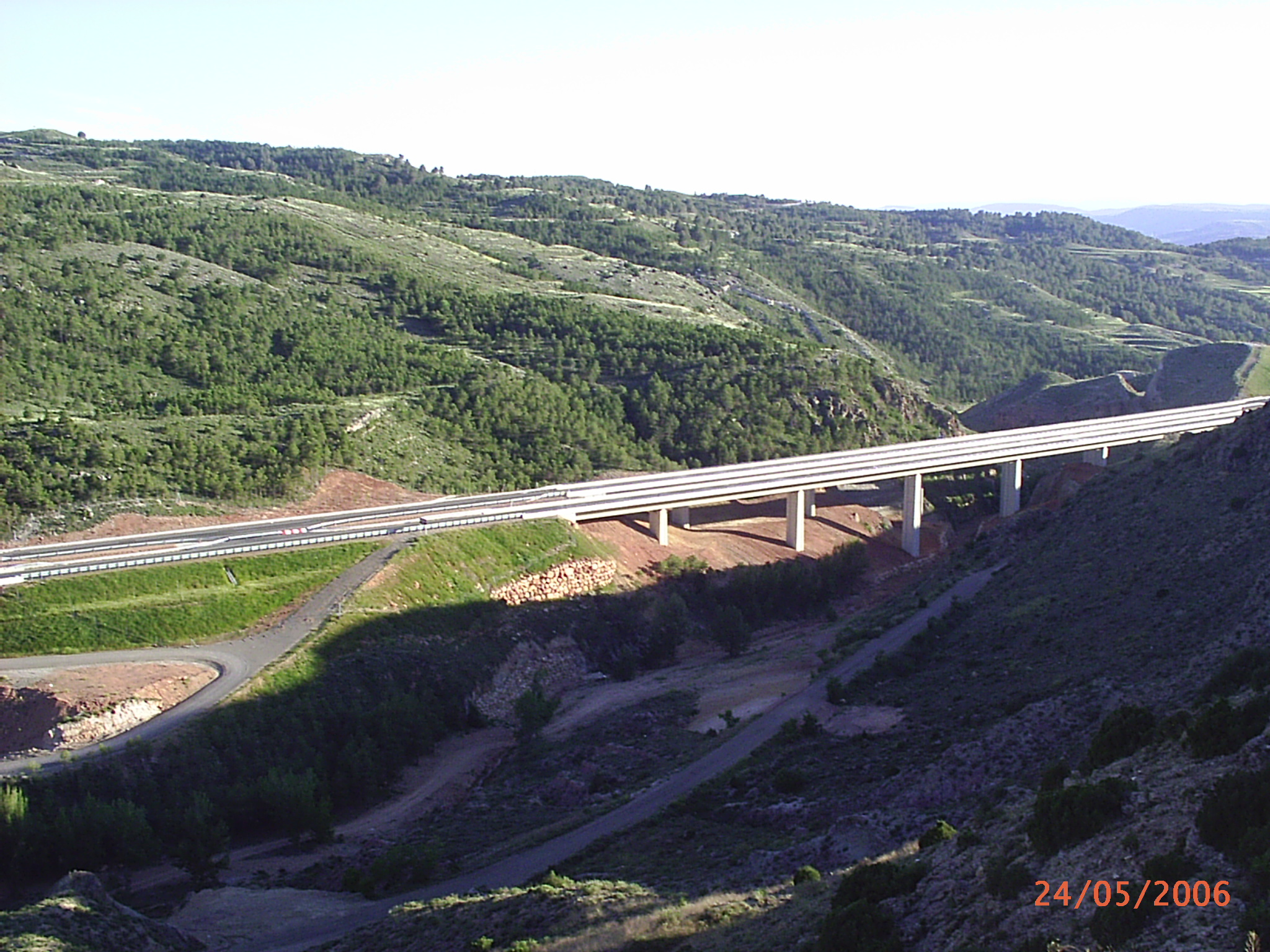 Autovía A-23 dirección Valencia